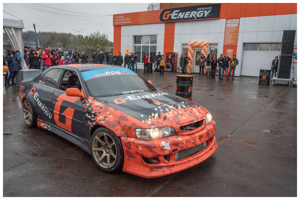 Торжественная церемония открытия 3 первых станций техобслуживания G-Energy Service в Москве. Ясенево.